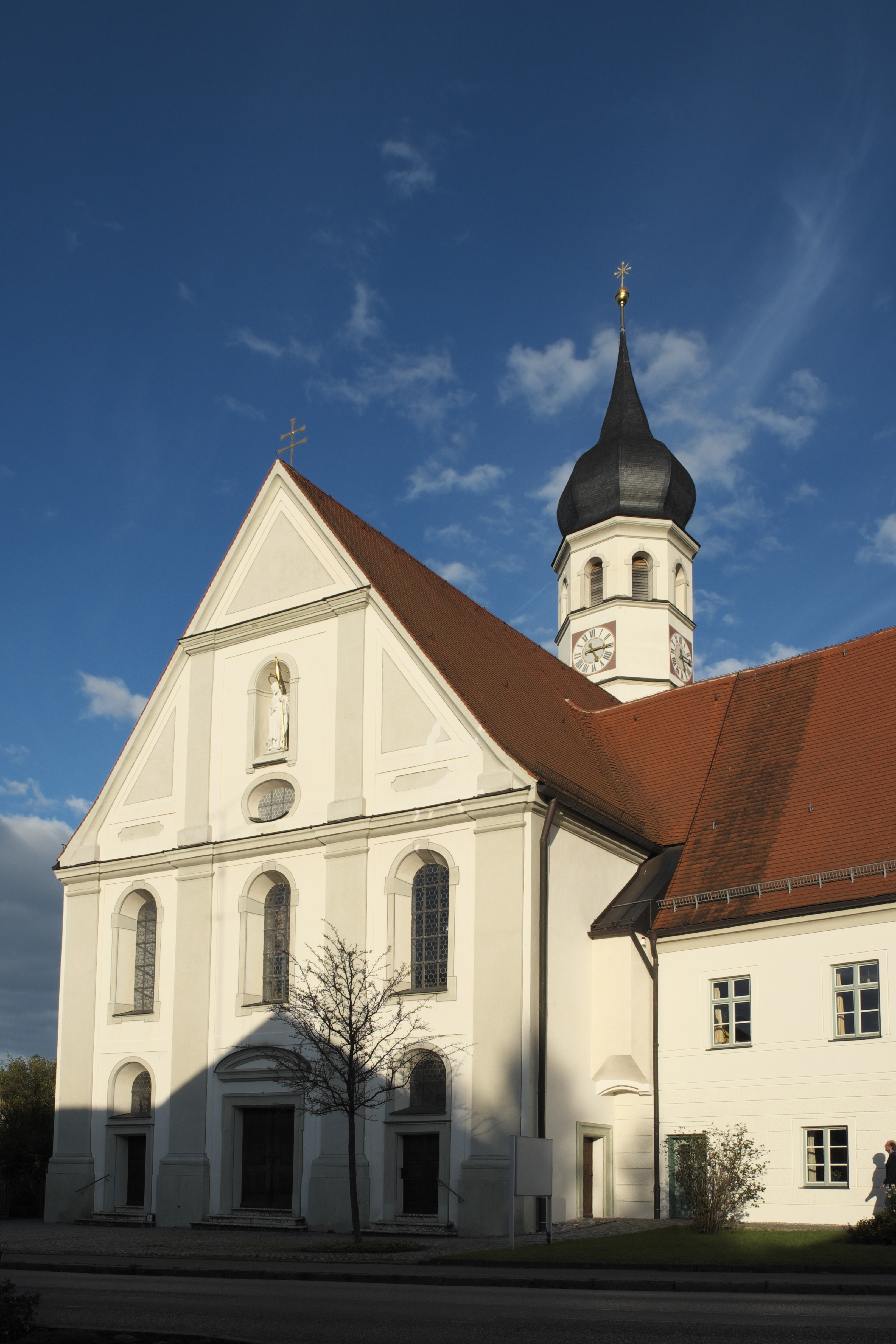 Ehemalige Augustinerchorherren-Stiftskirche, jetzt Pfarrkirche St. Johann Baptist, in Beyharting (Tuntenhausen) im Landkreis Rosenheim (Bayern/Deutschland)